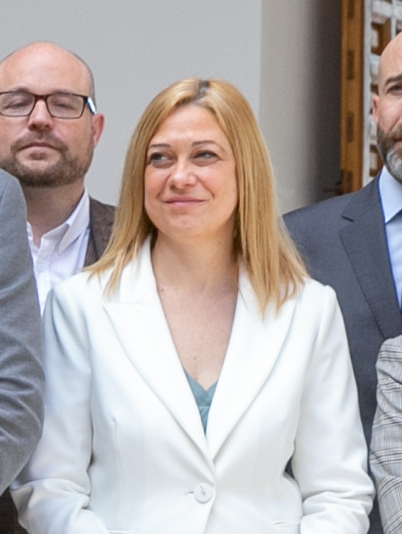 Toledo, 4 de marzo de 2020.-El vicepresidente de Castilla-La Mancha, José Luis Martínez Guijarro y el consejero de Hacienda y Administraciones Públicas, Juan Alfonso Ruiz Molina, se reúnen, en el Palacio de Fuensalida, con los representantes de los Grupos Parlamentarios de las Cortes Regionales -PP, Ciudadanos y PSOE- para abordar la reforma del Estatuto de Autonomía. (Fotos: A. Pérez Herrera // JCCM)